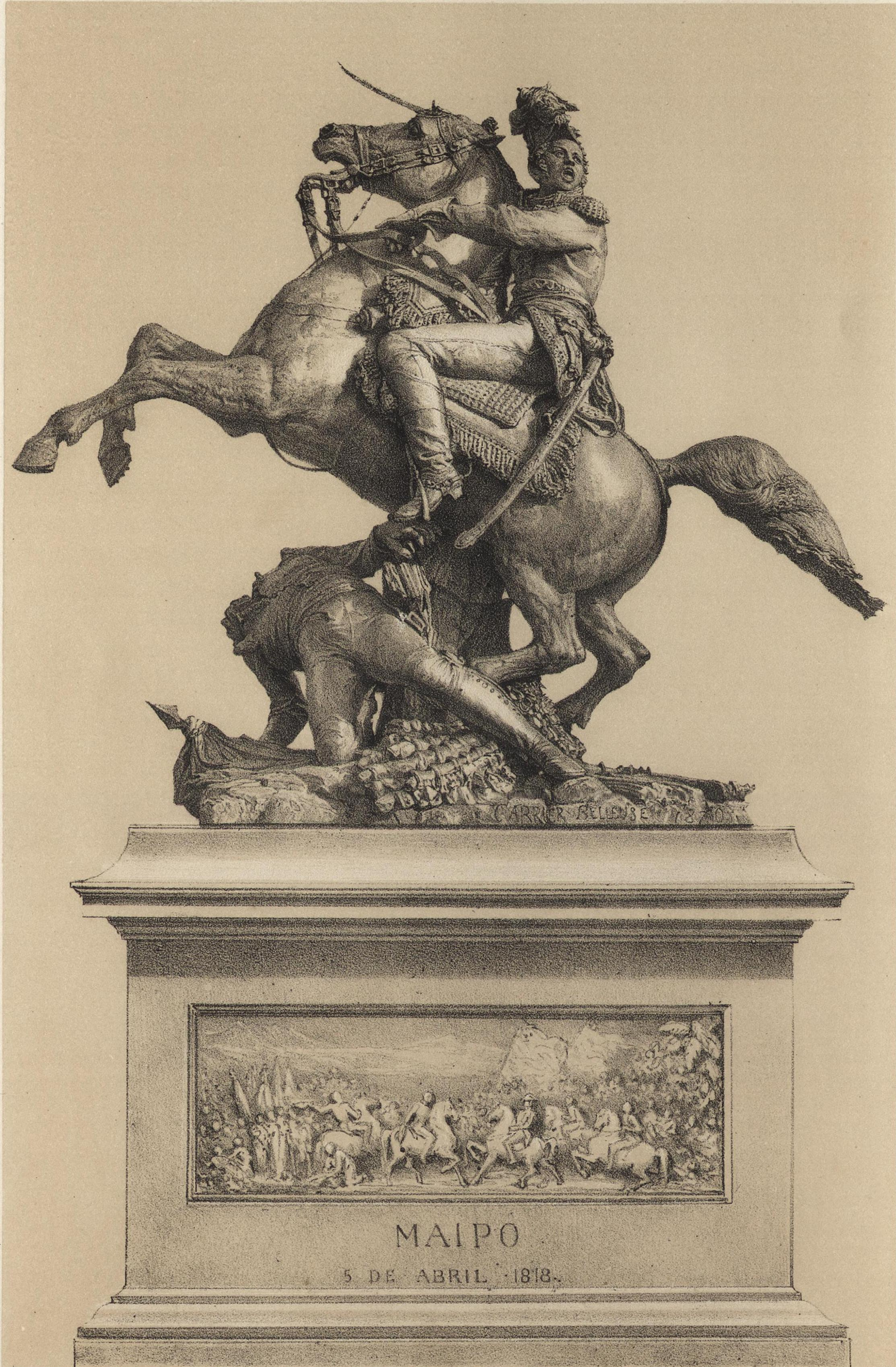 Estatua de Bernardo O´higgins.